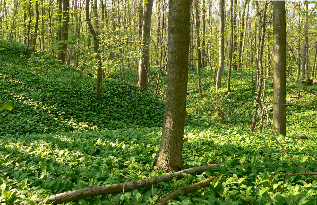 Burggelände der Harliburg